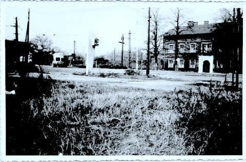 Miejsce obecnego Shella na Piaśnikach. Fotka z 1970 roku